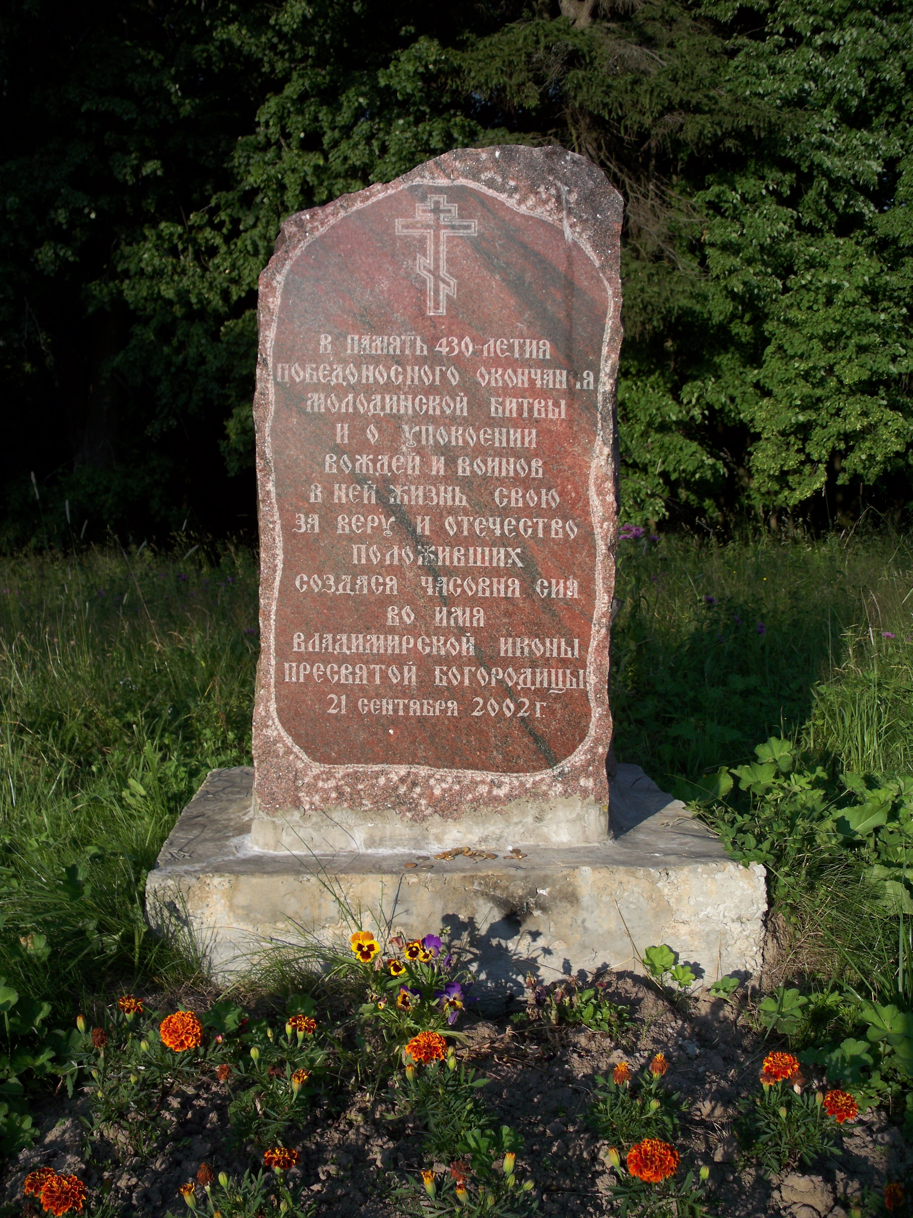 Село Молоди. Закладной камень в память победы в Битве при Молодях в 1572 году.